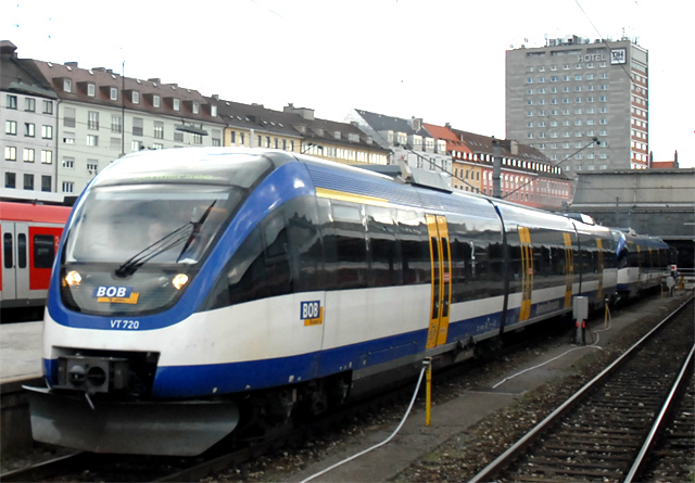 Bayerische Oberlandbahn VT 720 + VT 725 te München Hbf (Starnberger Bf)